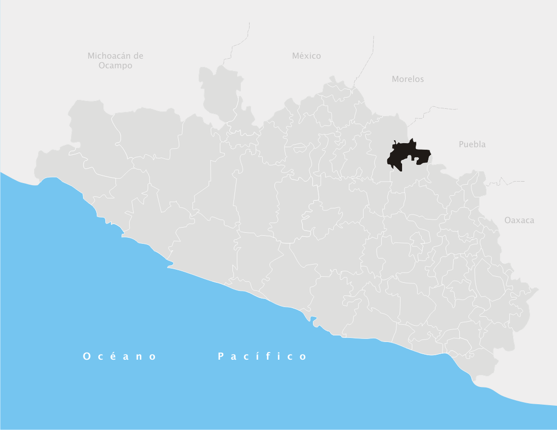 Atenango del Río en el estado de Guerrero (México)